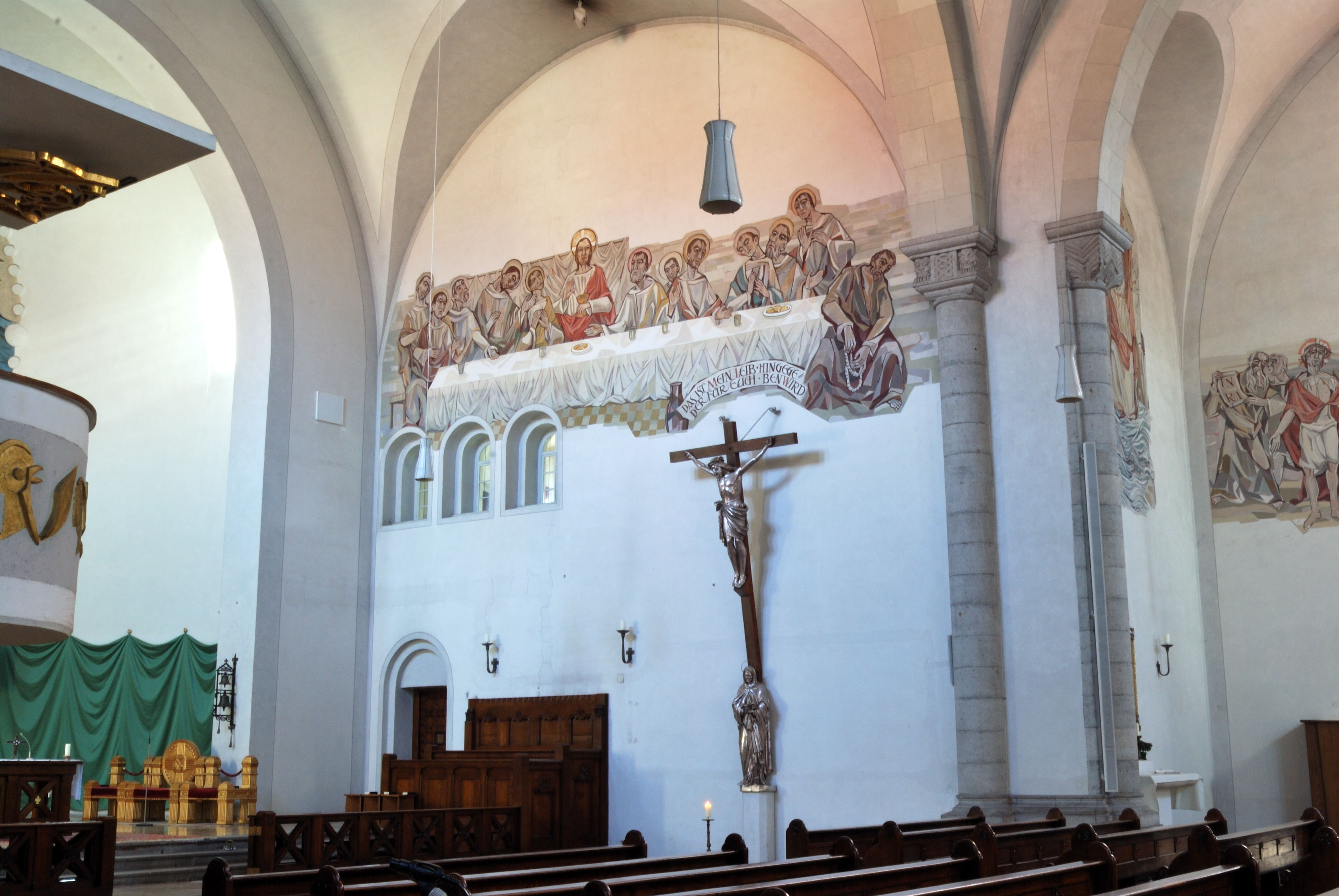 Blick zur Südwand des Presbyteriums: Abendmahl von Michael Weingartner